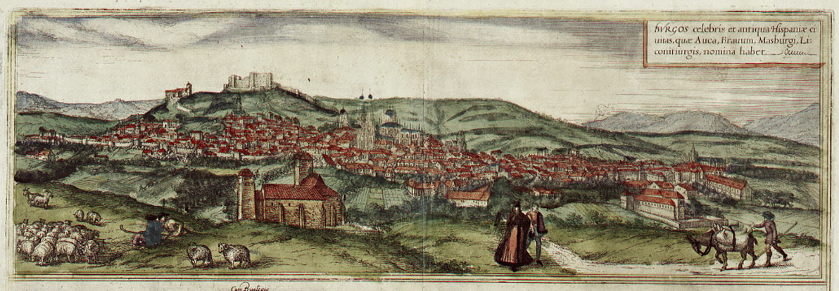 Burgos